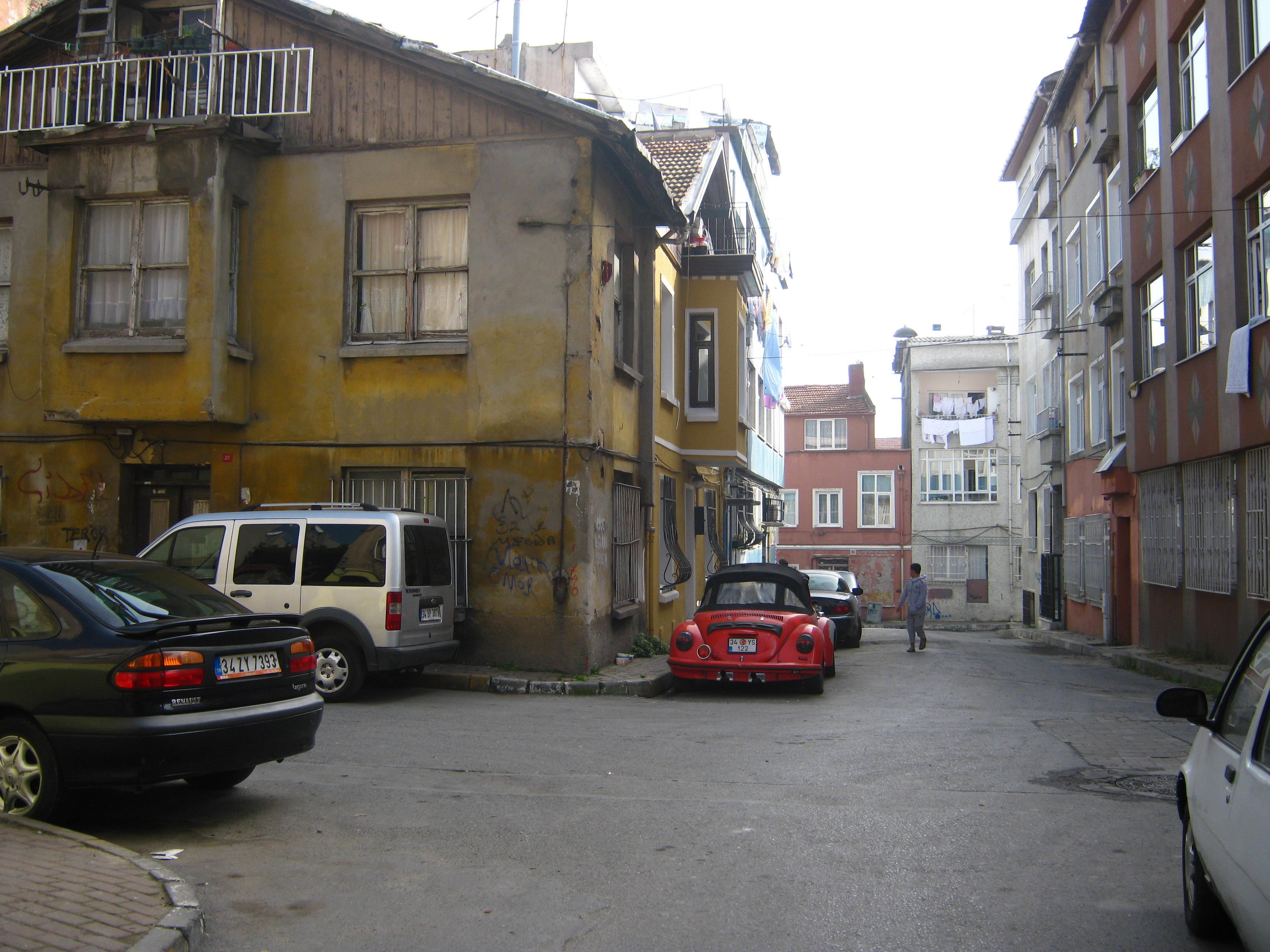 Samatya'da bir sokak